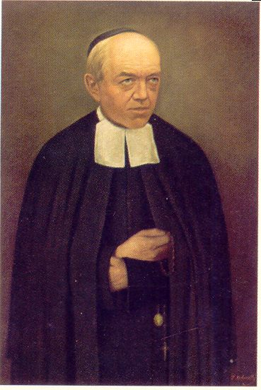 Saint Brother Mutien-Marie Wiaux